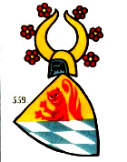 Mutmaßliches Wappen der Herren von Rötteln zu Rotwasserstelz (Hohentengen). Siehe hierzu Otto Roller: Die Geschichte der Edelherren von Rötteln, in: Blätter aus der Markgrafschaft, 1927, S. 154